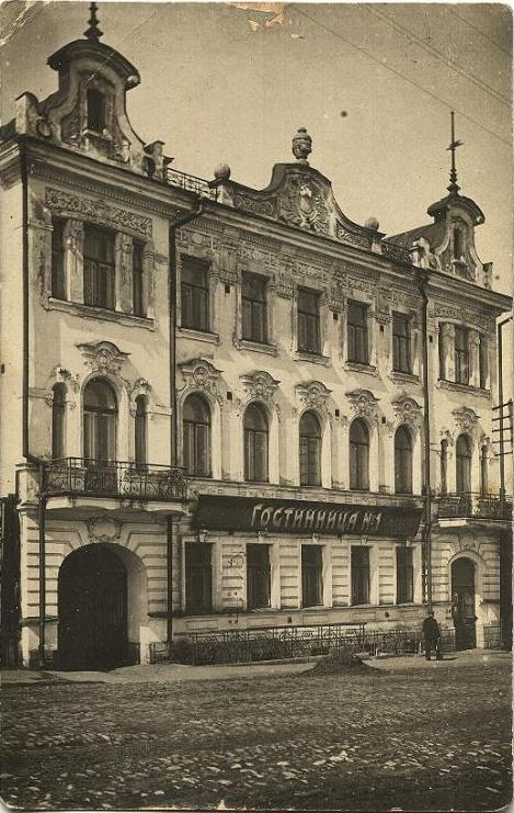 Гостиница № 1 в Перми